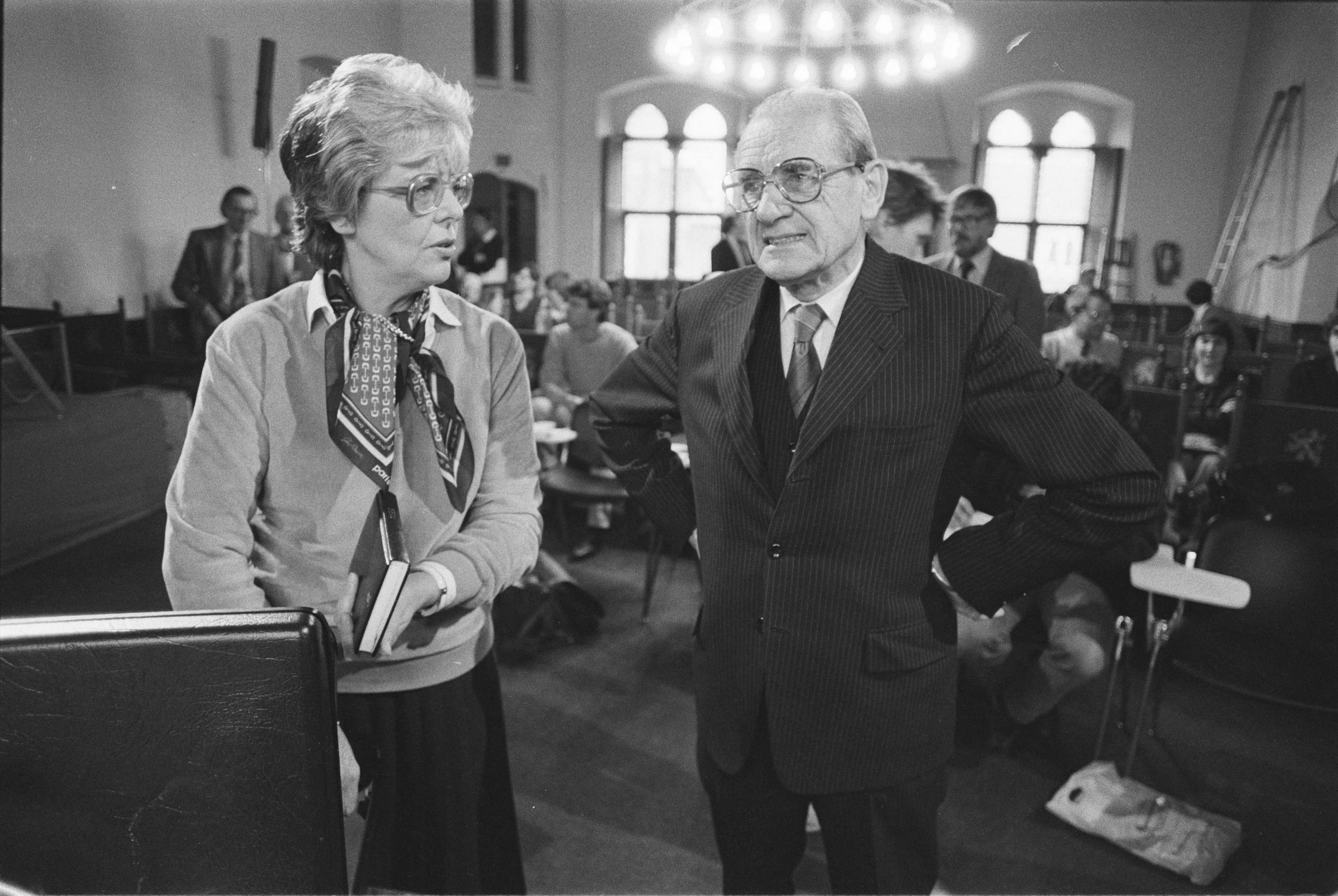 Collectie / Archief : Fotocollectie Anefo Reportage / Serie : Enquetecommissie RSV Beschrijving : Getuige A. Winsemius in gesprek met mevrouw Len Rempt-Halmmans de Jongh Datum : 28 maart 1984 Locatie : Den Haag, Zuid-Holland Trefwoorden : hoorzittingen, parlementaire enquêtes, parlementariërs, politiek Persoonsnaam : Rempt-Halmmans de Jongh, Len, Winsemius, A. Instellingsnaam : RSV Fotograaf : Bogaerts, Rob / Anefo Auteursrechthebbende : Nationaal Archief Materiaalsoort : Negatief (zwart/wit) Nummer archiefinventaris : bekijk toegang 2.24.01.05 Bestanddeelnummer : 932-9160